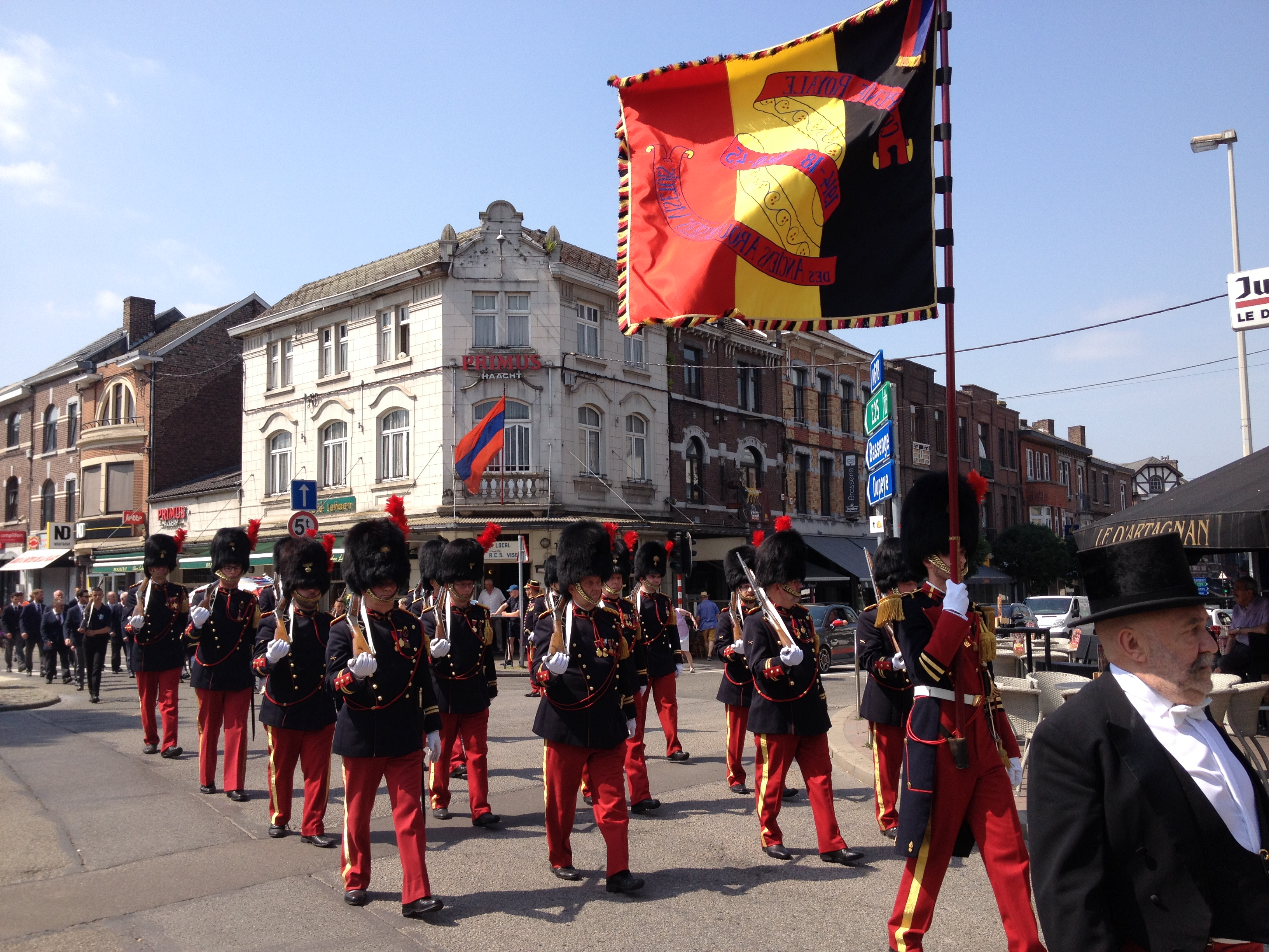 Zomerkermis "Fête d'Été" van de haakbusschutters of kloveniersgilde "Compagnie royale des Anciens Arquebusiers" in Visé op zondag 30 juni 2019.